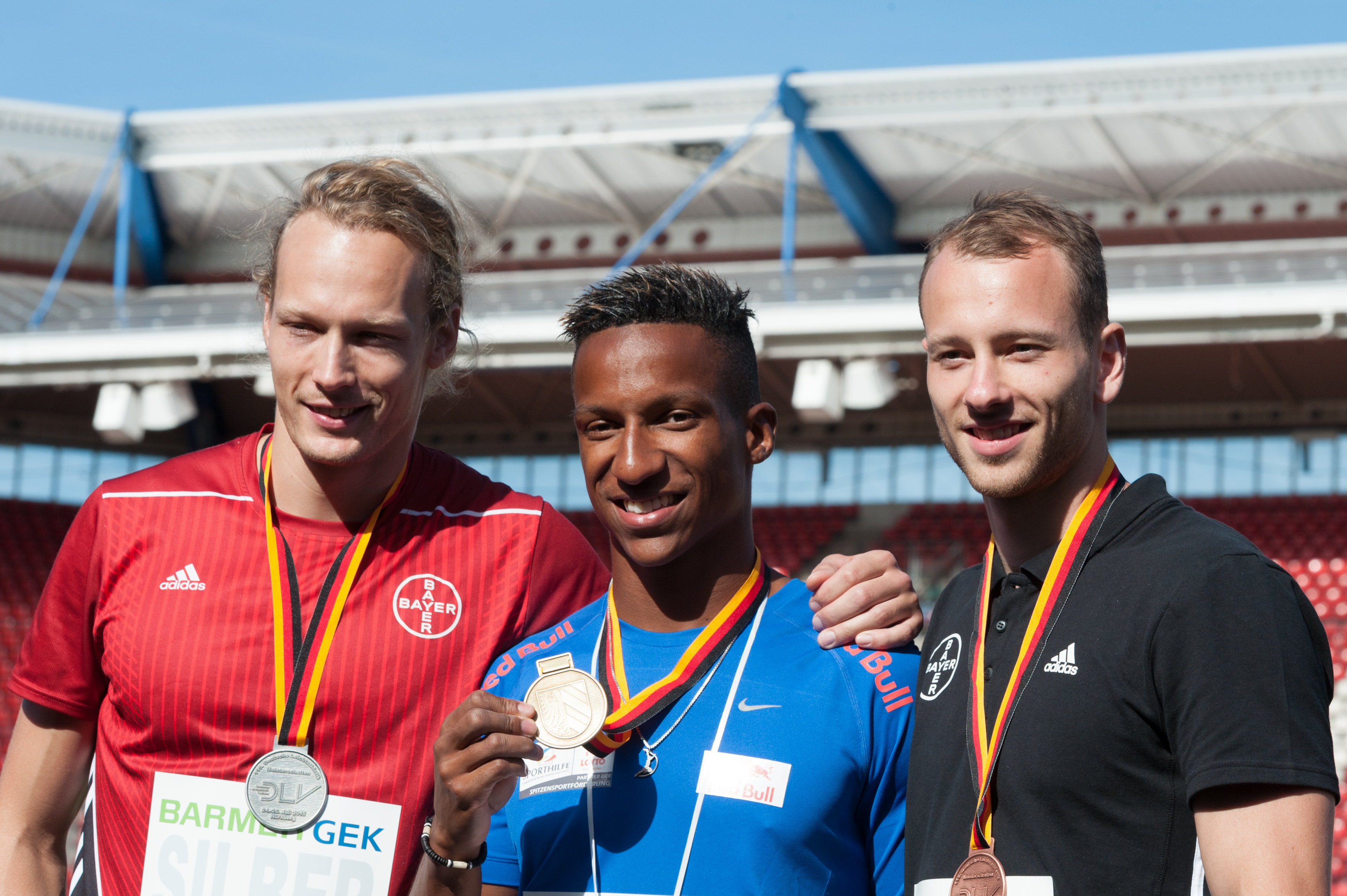 Deutsche Leichtathletik-Meisterschaften 2015: Männer Stabhochsprung - Tobias Scherbarth, Raphael Holzdeppe, Carlo Paech